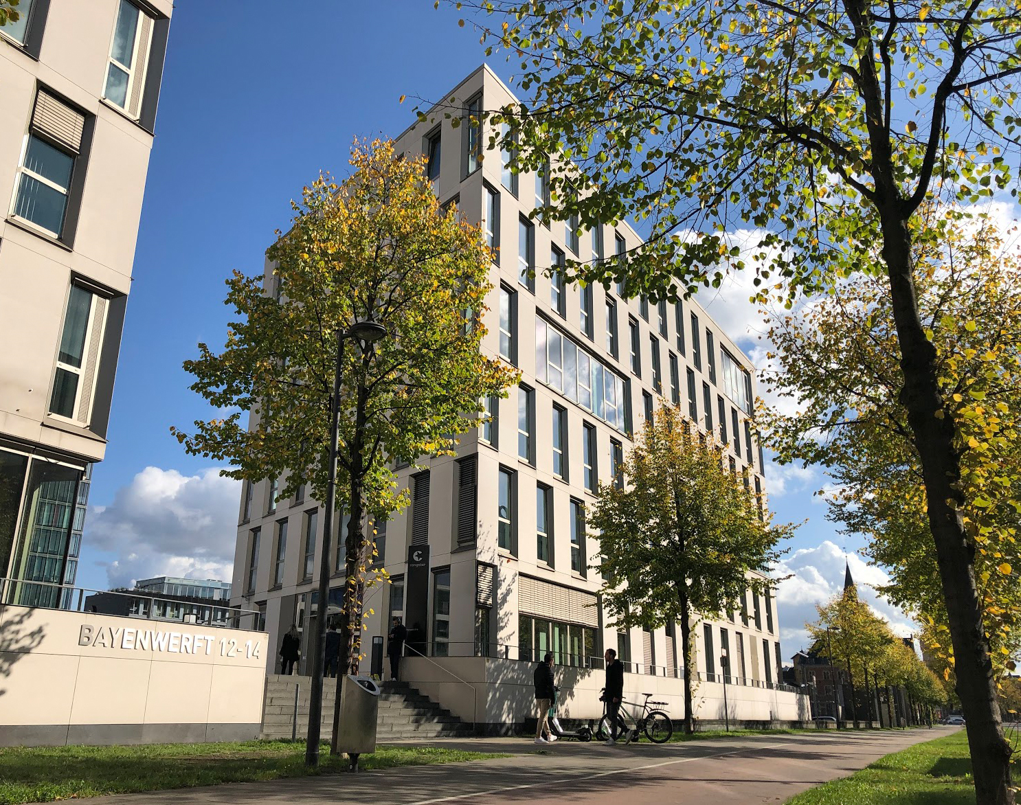 Fotografie des congstar Firmensitzes an der Bayenwerft 12-14 (Köln Rheinauhafen)